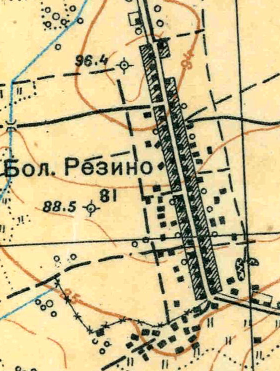 Топографическая карта Ленинградской области, квадрат О-36-13-А-а (Большая Пудость), деревня Большое Рейзино